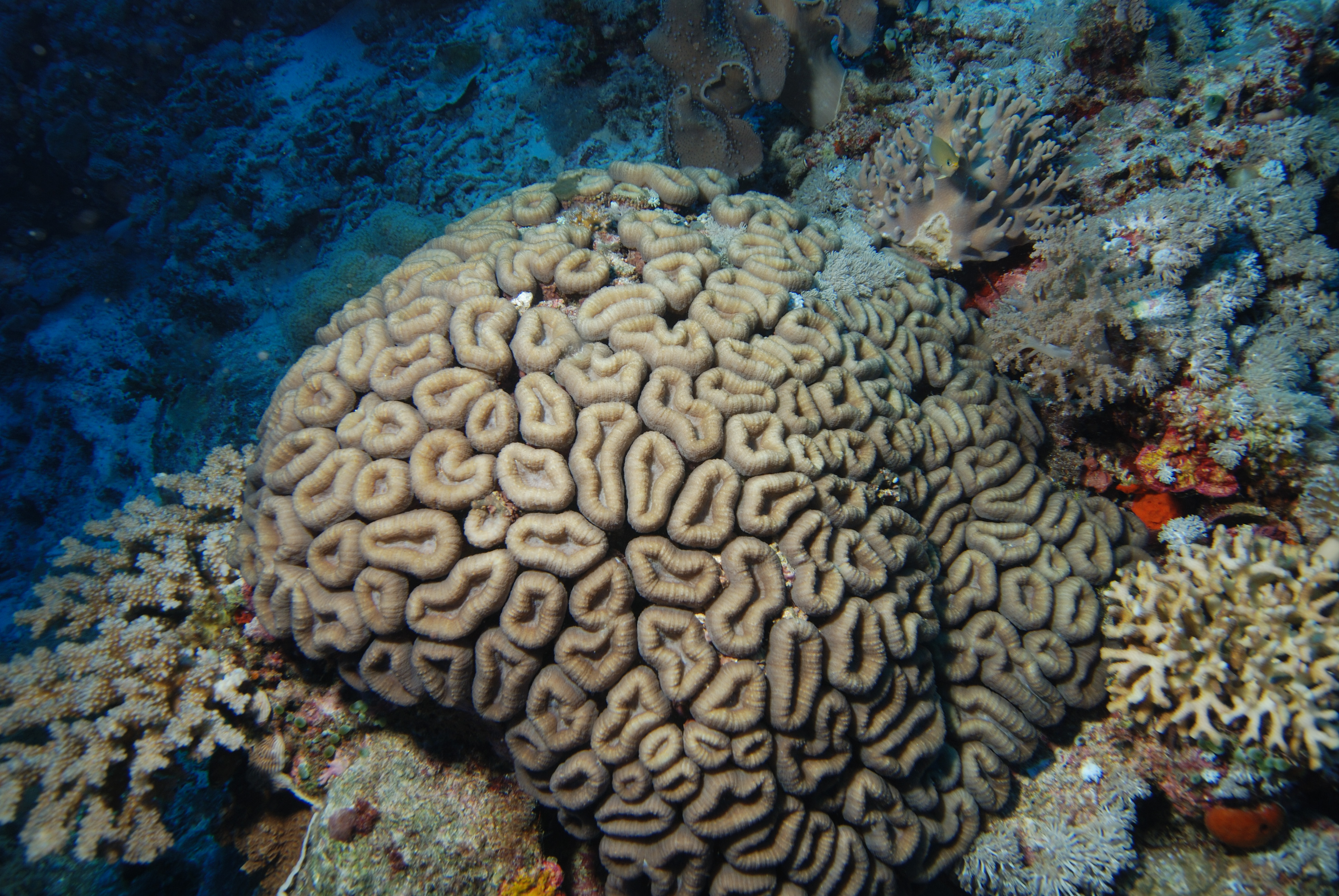 steenkoraal (Favia sp.)